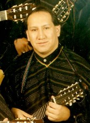 Ariel Villazón en Proyección - 2006